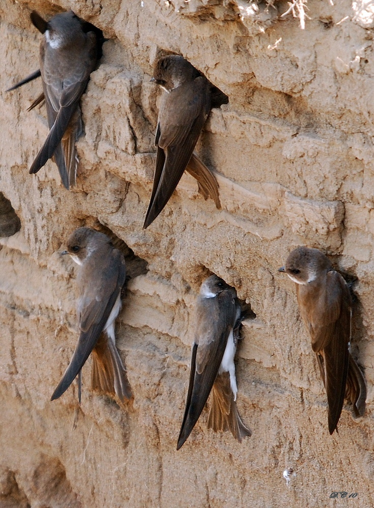 Kurdî: Li Tepêya Baravan(Behramkê) hatiye kişandin.